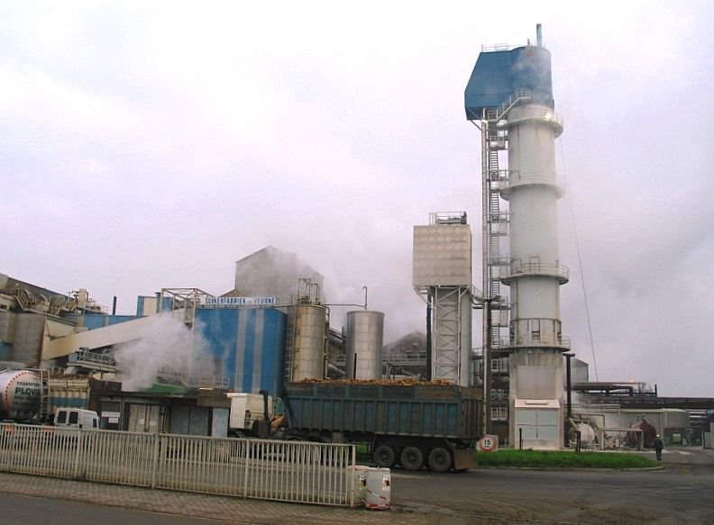 suikerfabriek - eigen foto